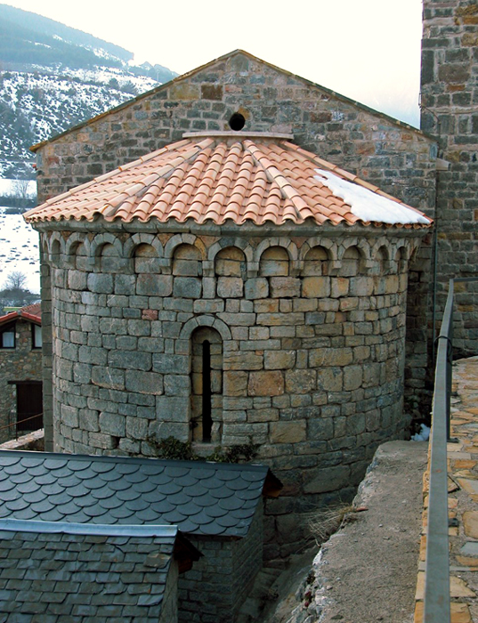 Viu de Llevata, municipi del Pont de Suert, Alta Ribagorça, Catalunya. Església parroquial de Santa Maria, absis decorat amb arcuacions llombardes. Romànic llombard segle XII.